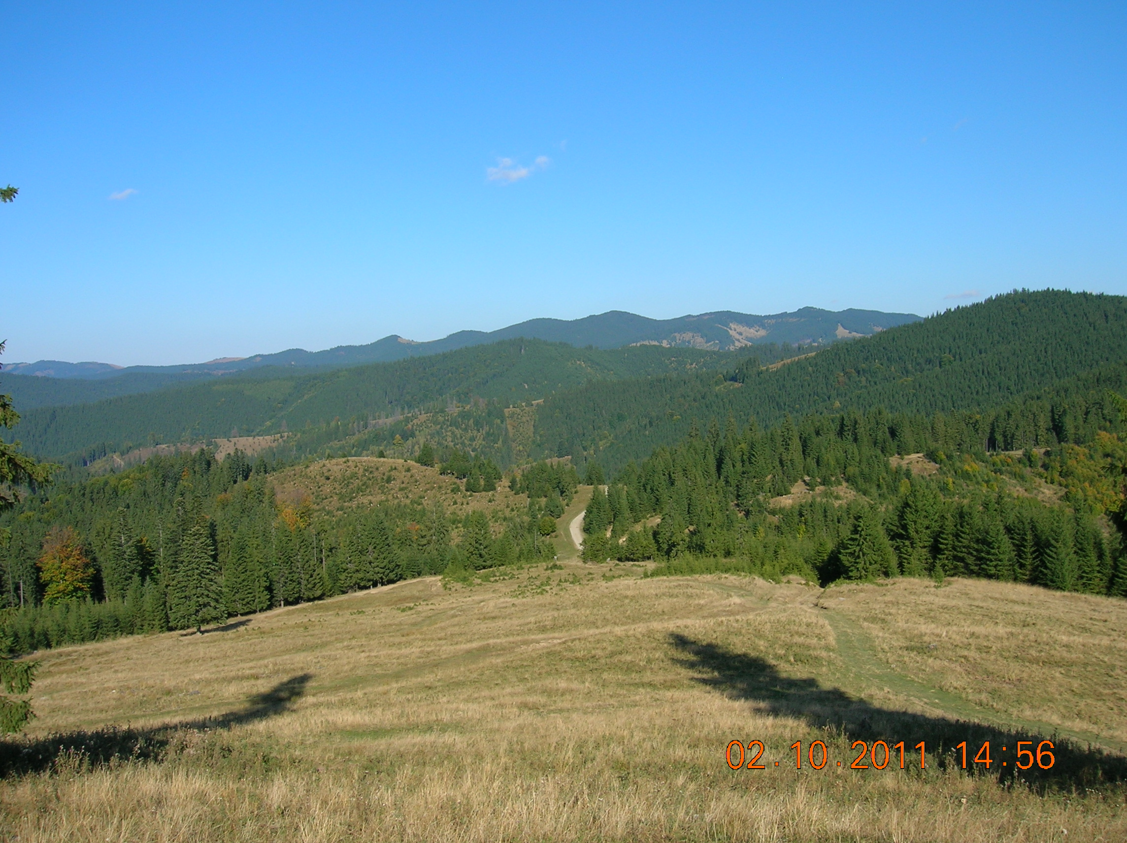 Munţii Tarcăului (Carpaţii Orientali, România)-Puţin mai sus de Şeaua Fagului - în plan îndepărtat culmea Muntelui Lung (M. Tarcăului) cu Vîrfurile Muhos şi Cotului.În planul II este adîncitura Văii Dămucului, spre care coboară la stînga panglica şoselei.